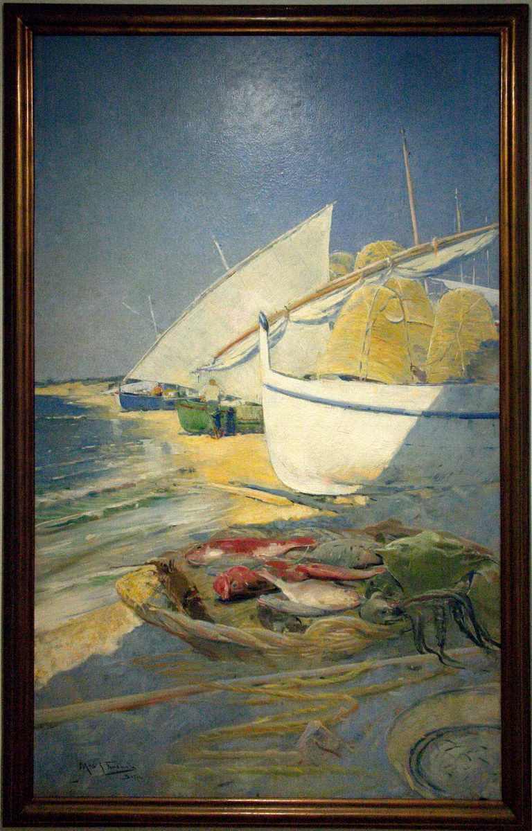 "La Pesca",1895, obra d'Arcadi Mas i Fontdevila al Museu Maricel de Sitges